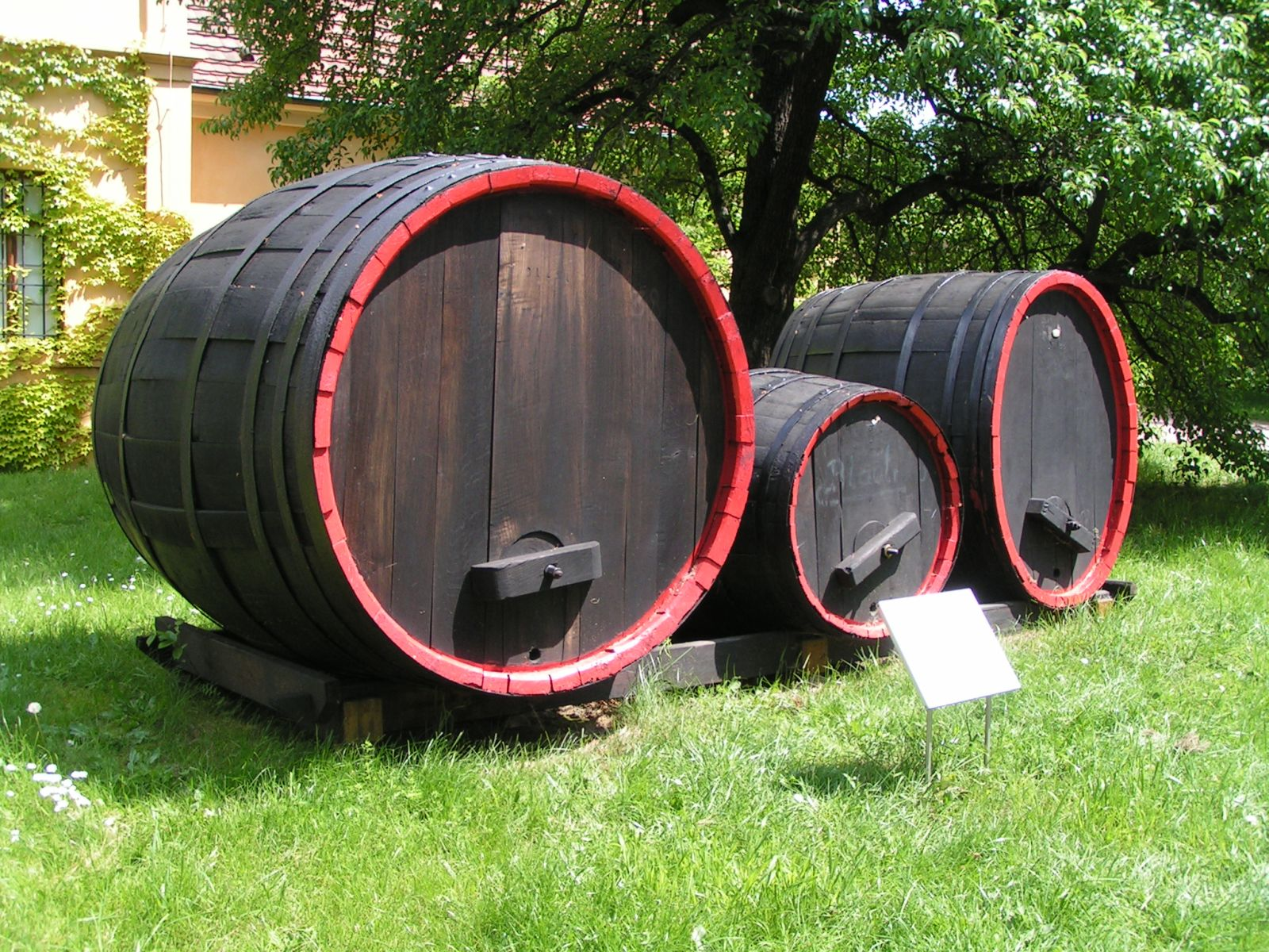 Drei Weinfässer - zwei Fuderfässer zu 3125 und 1000 Liter und ein Stückfass zu 1400 Liter, aufgestellt in Radebeul am Hoflössnitz unterhalb des Spitzhauses